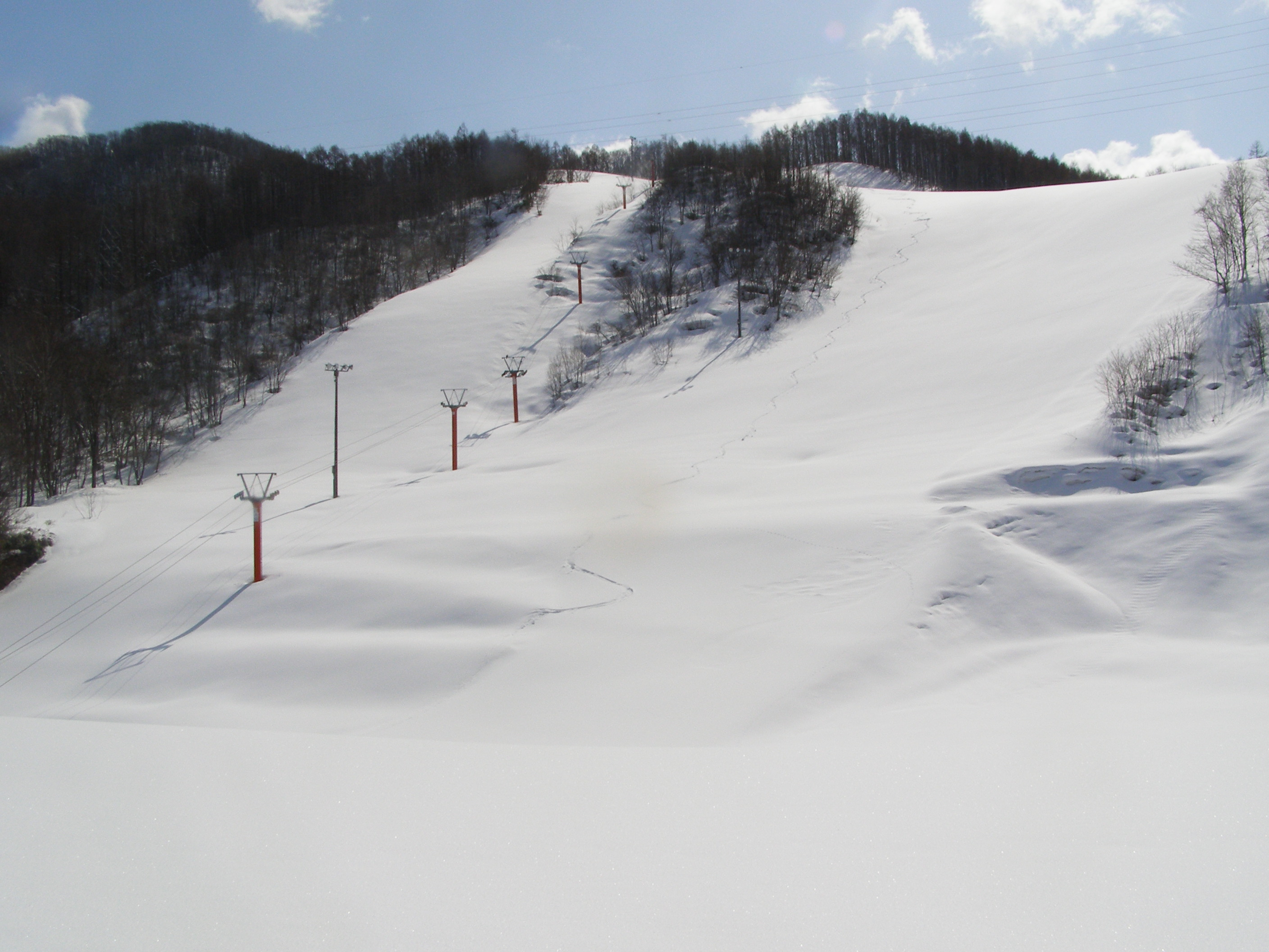 仁木町営スキー場